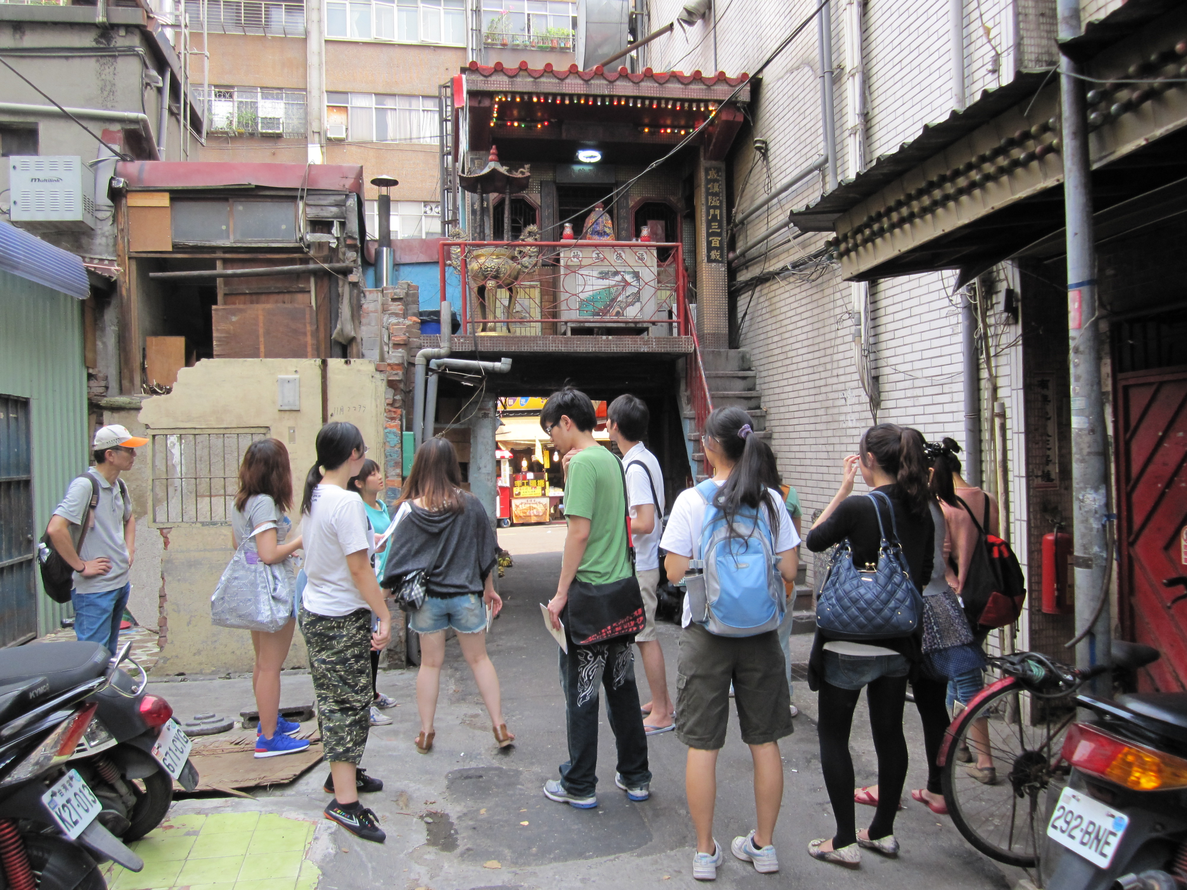 艋舺隘門後面